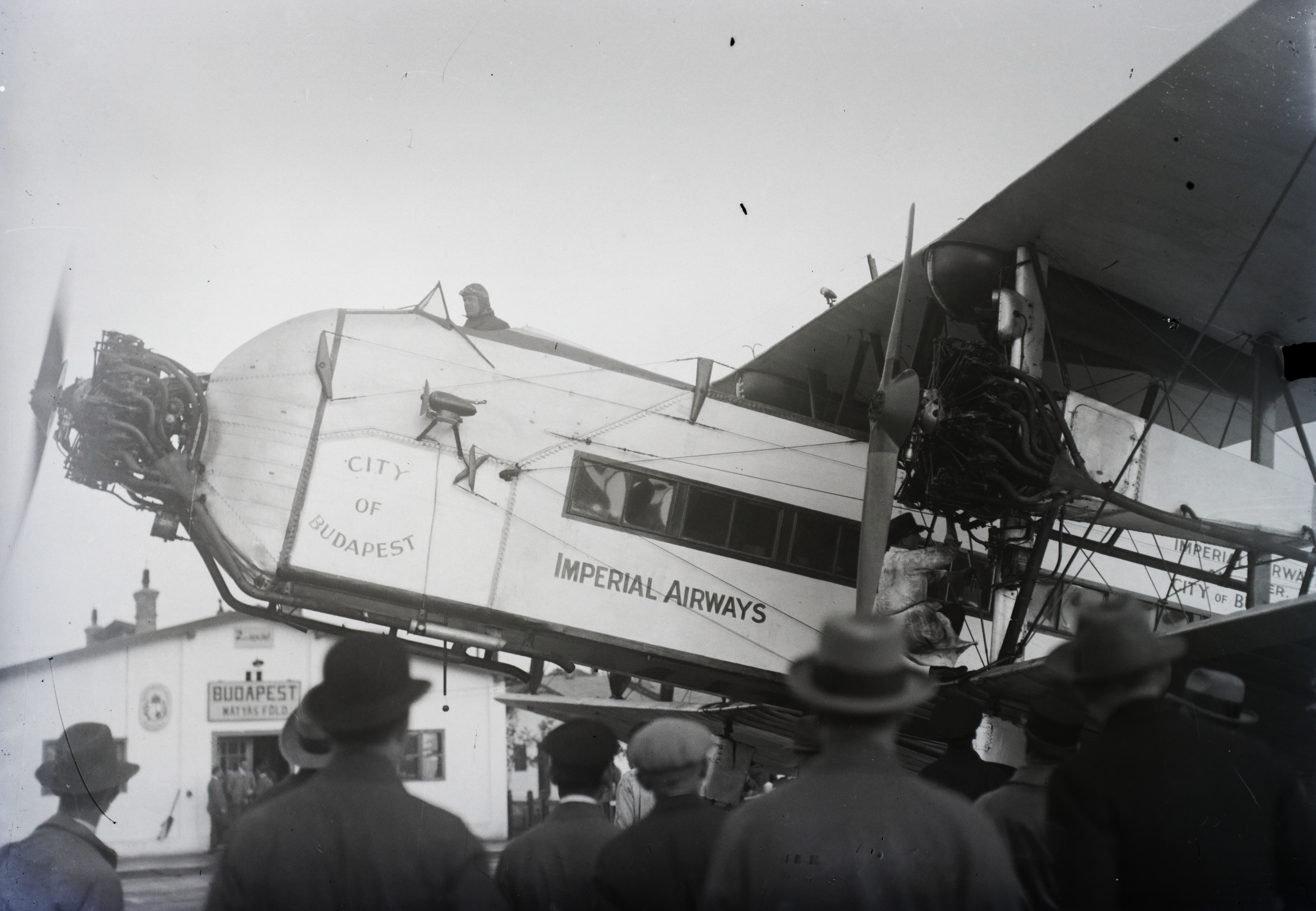 Imperial Airways angol légiforgalmi társaság Bristol repülőgépe Mátyásföldön. Leltári jelzet: 1320.